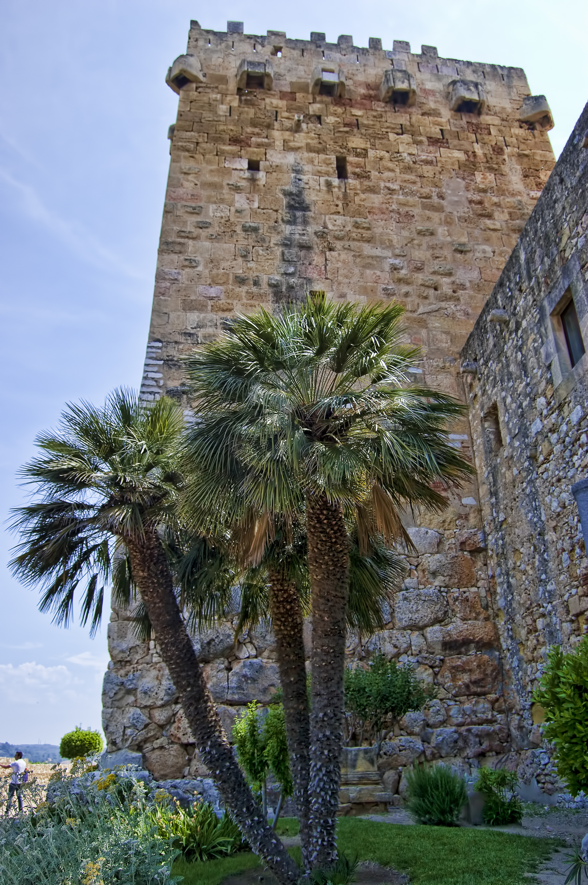 Muralles romanes. Tarragona